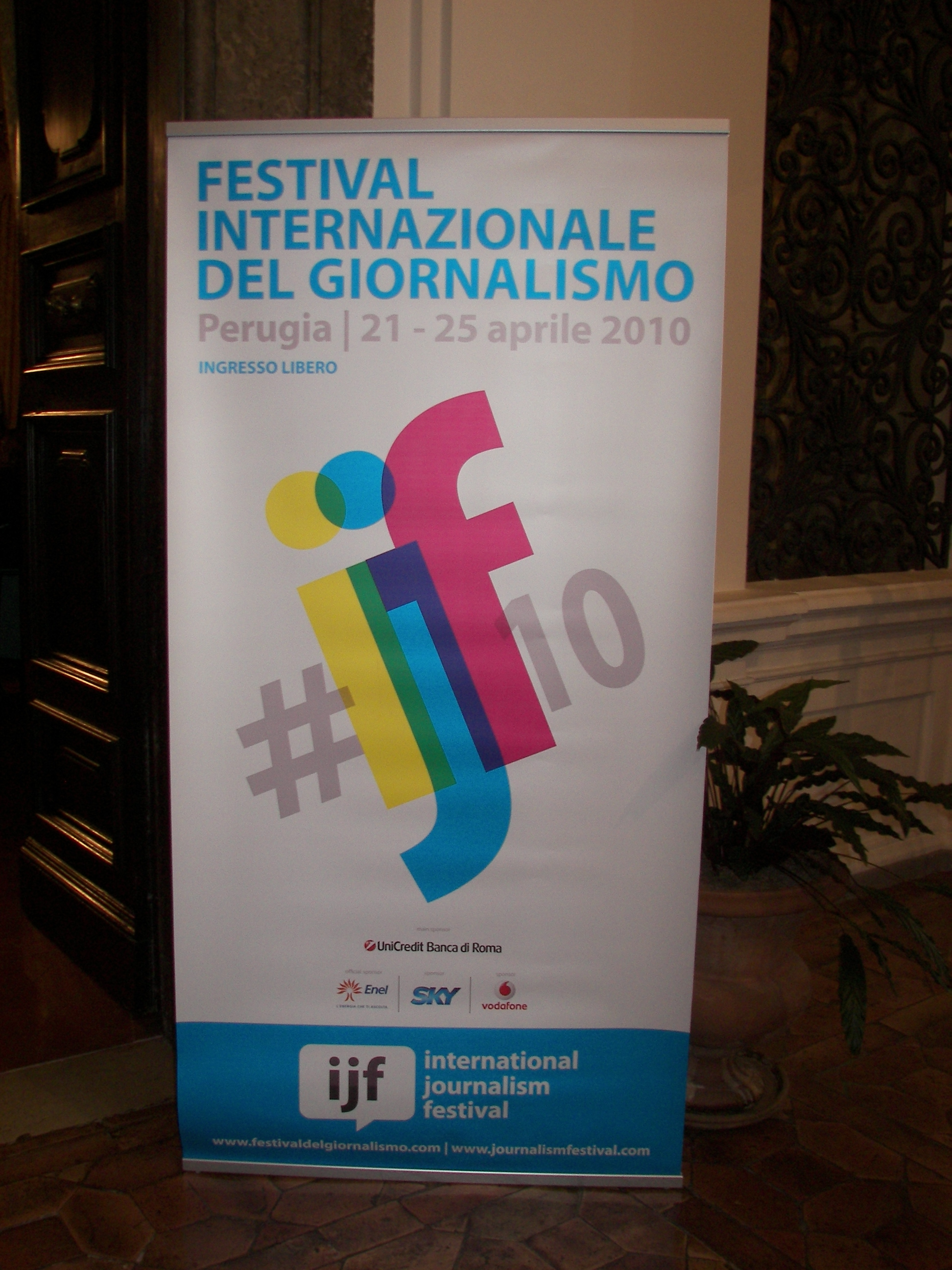 19 Marzo, Perugia Palazzo Donini Salone d'Onore